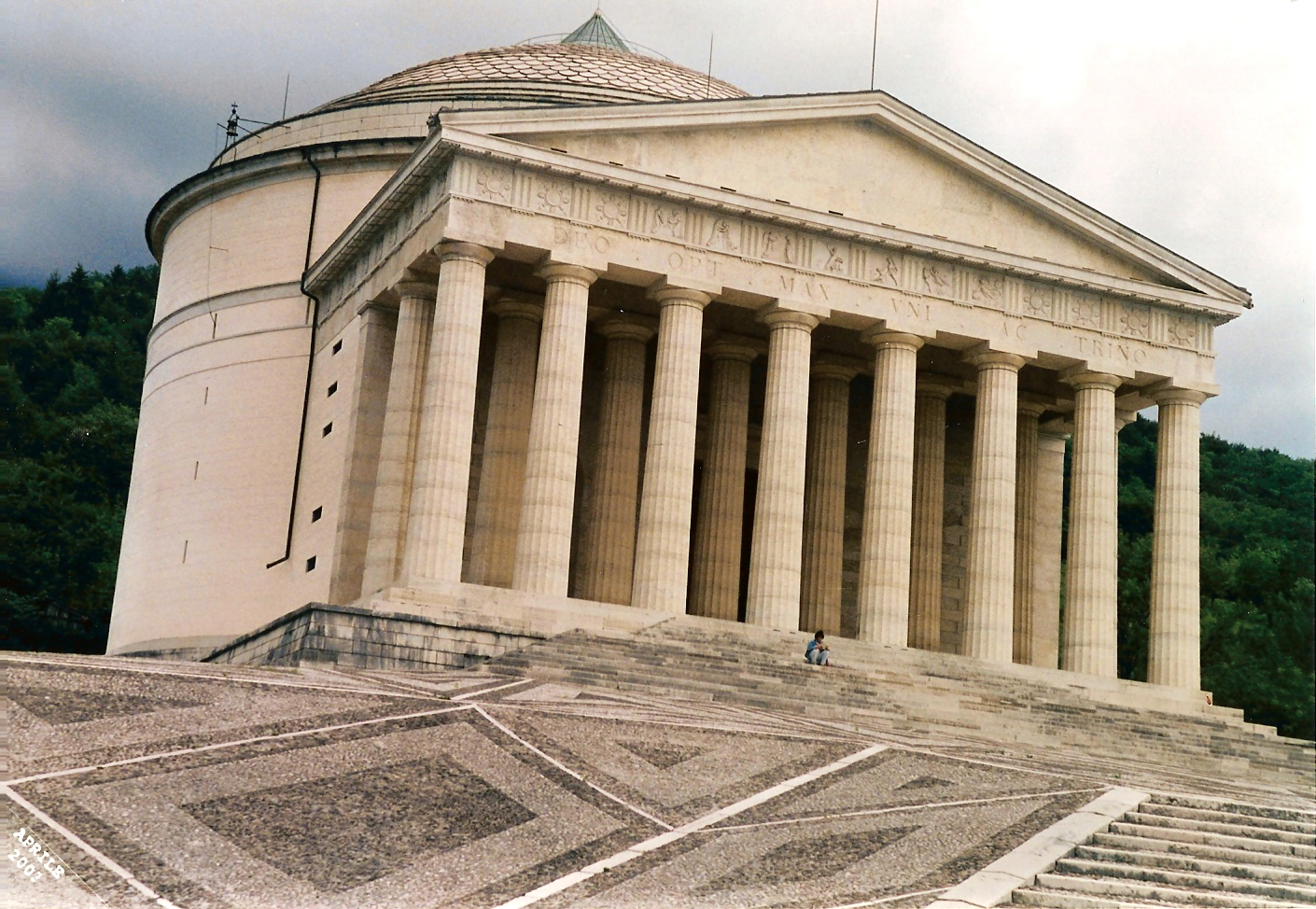 Tempio canoviano di Possagno (Treviso).